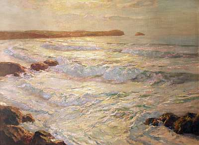 Verano en el mar - óleo sobre lienzo - Alto: 76,3 cm. Ancho: 105 cm, - Worcester City Museums